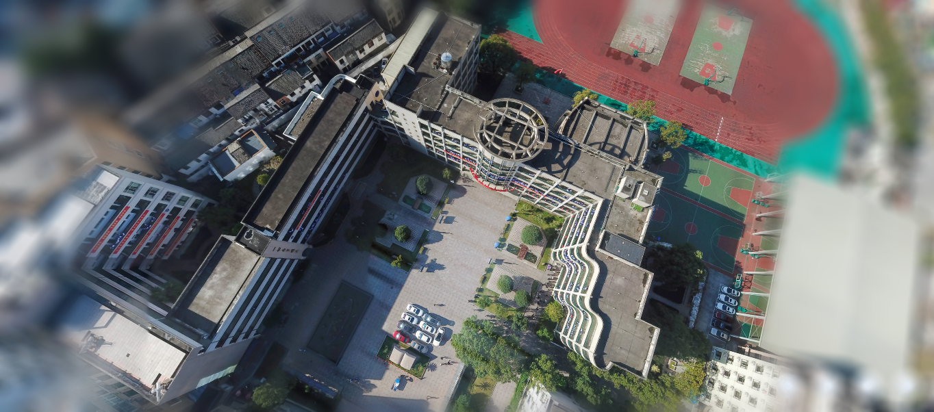 中文（中国大陆）: 浙鳌中学教学楼综合体